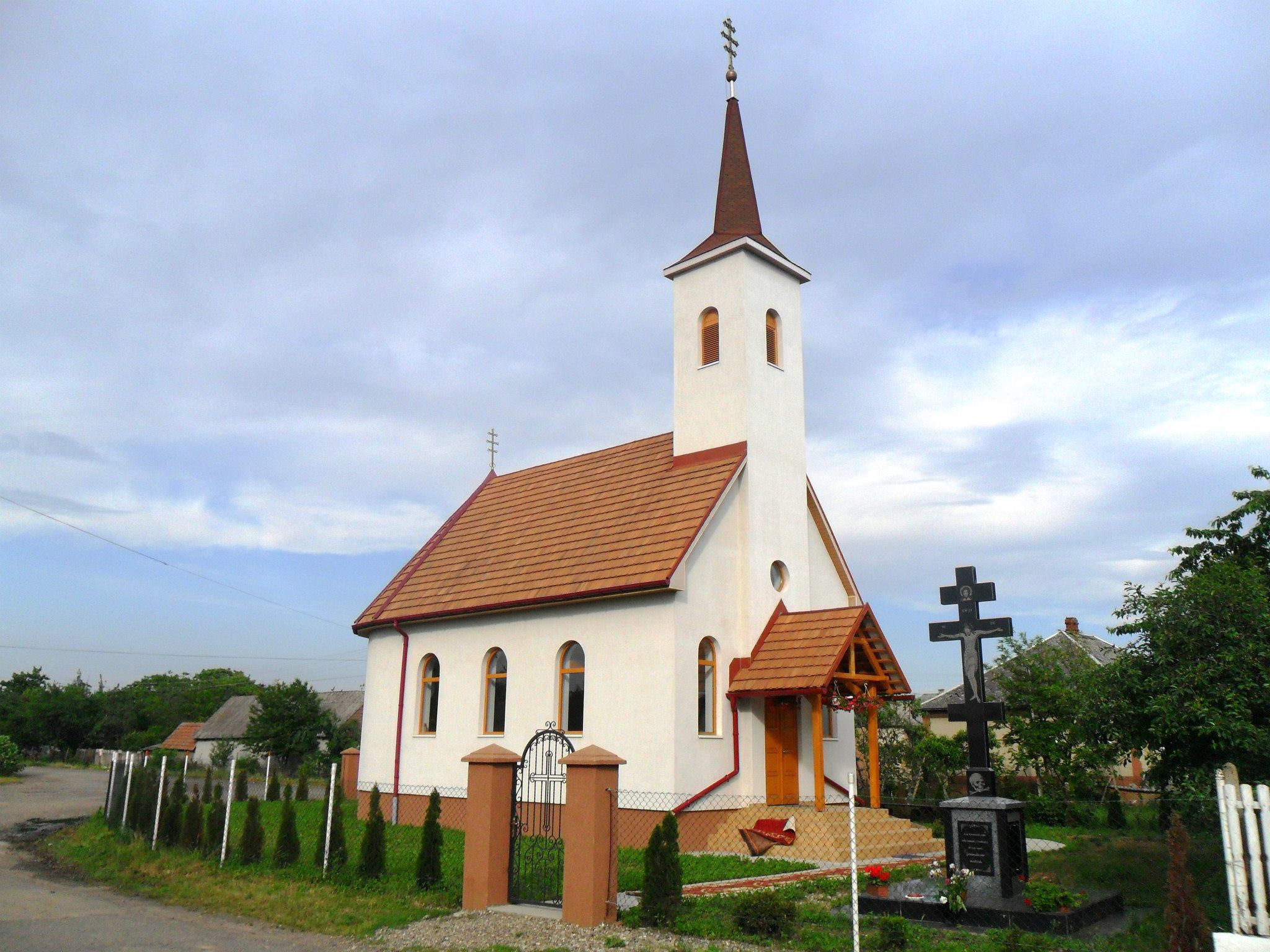 Nevetlefalu görög katolikus temploma (2013)